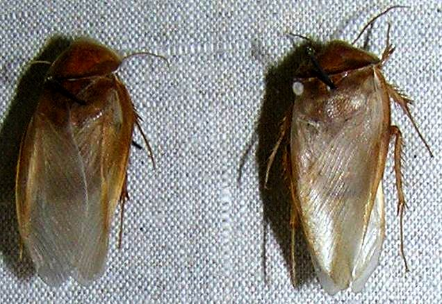 Самцы таракана Polyphaga pellucida. Зоологический музей в Санкт-Петербурге. This photograph taken in Zoological Museum of the Zoological Institute of the Russian Academy of Sciences Note: It is only museum co-ordinates, instead of an area of live animals.